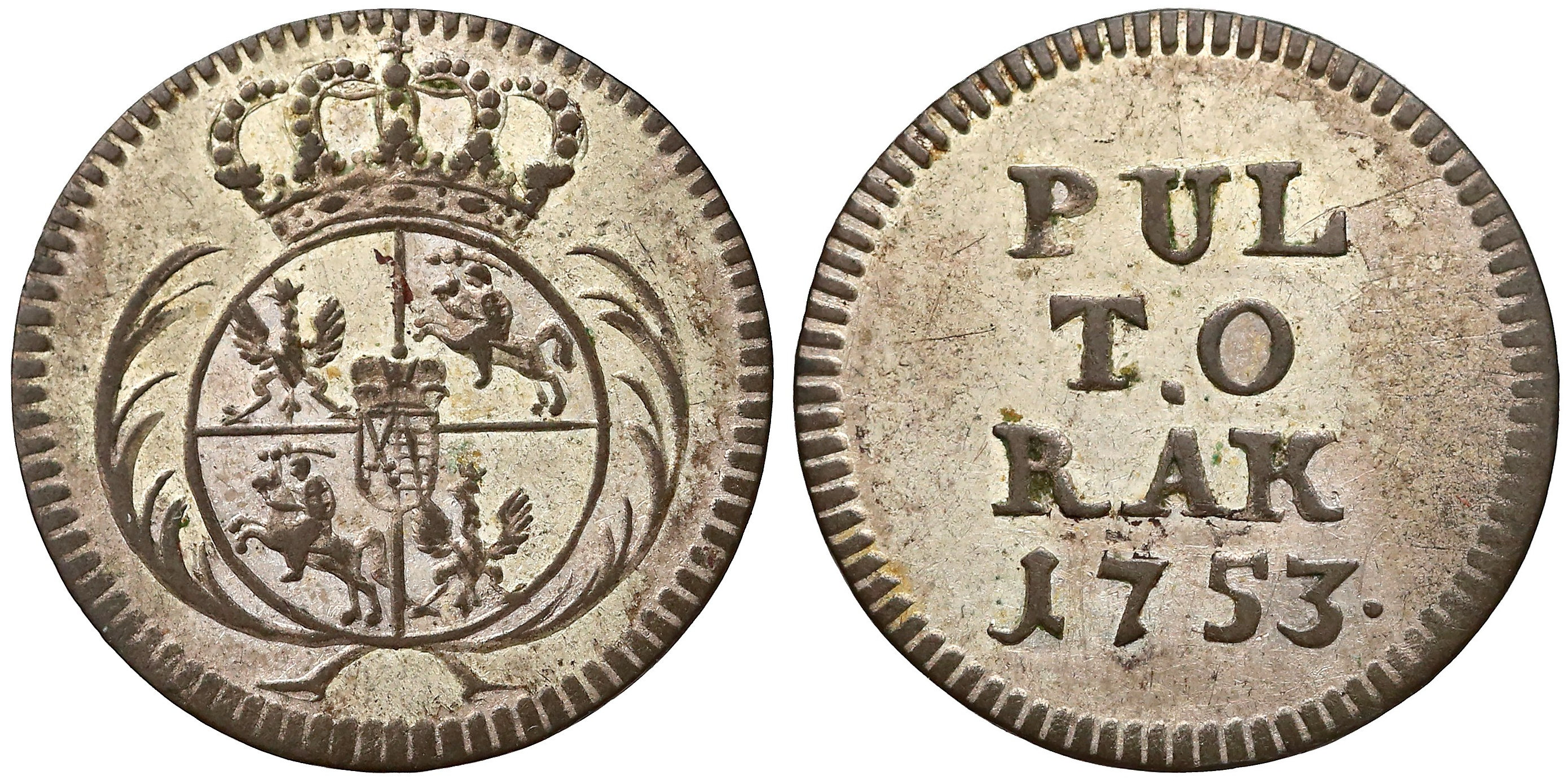 Półtorak koronny 1753 Lipsk